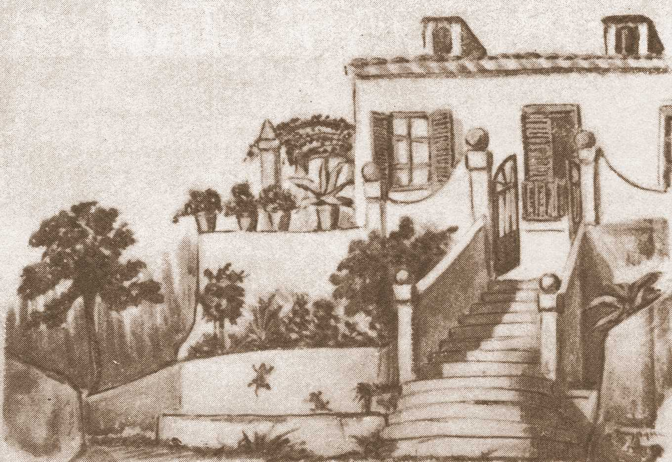 Dibujo de Maurice Sand de la casa que compartieron, en Mallorca, Chopin y George Sand. Por esta época, George Sand escribió Un hiver à Majorque (Inagrama Editorial, Mallorca, España (1997). ISBN 84-85932-18-8, que reproduce el original conservado en Celda Museo nº 2, Valldemosa.